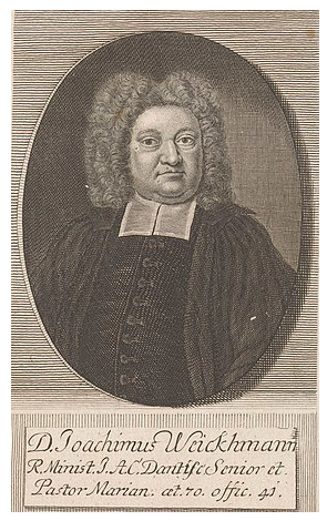 IdentificatieTitel(s): Portret van Joachim WeickhmannObjecttype: prent Objectnummer: RP-P-1914-1862Catalogusreferentie: HAB A 23461Opschriften / Merken: verzamelaarsmerk, verso, gestempeld: Lugt 2228VervaardigingVervaardiger: prentmaker: Martin BernigerothPlaats vervaardiging: LeipzigDatering: 1732Fysieke kenmerken: gravure met stippelwerkMateriaal: papier Techniek: graveren (drukprocedé) / stippelwerkAfmetingen: plaatrand: h 155 mm × b 100 mmToelichtingPrent ook gebruikt in: Deutsche Acta Eruditorum (...). dl. 166. Leipzig: Johann Gottlieb Gleditsch, 1732.OnderwerpWat: historical personsWie: Joachim WeickhmannVerwerving en rechtenVerwerving: aankoop 1905Copyright: Publiek domein